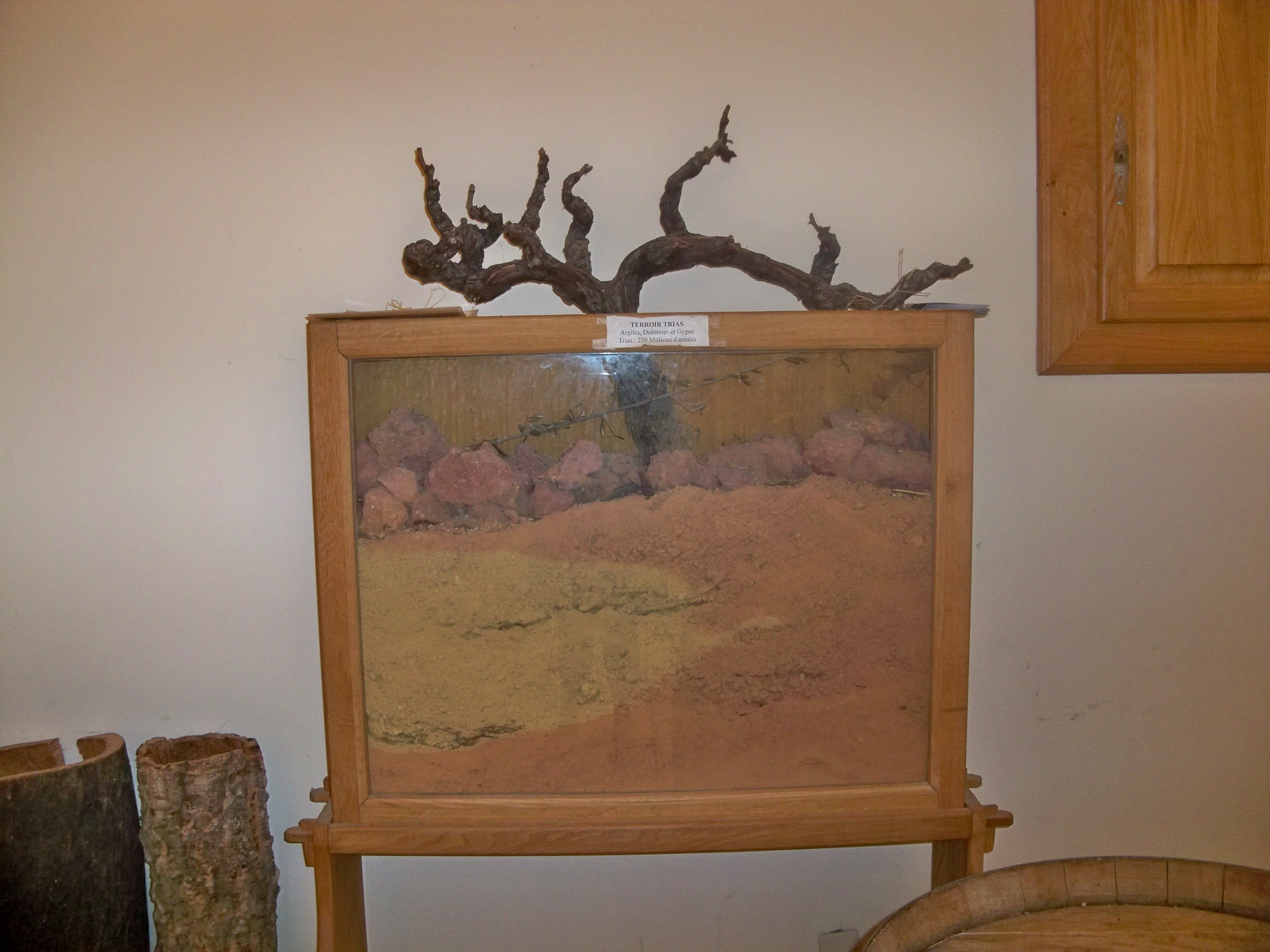 Vigne de Beaumes de Venise (Vaucluse), terroir du Trias